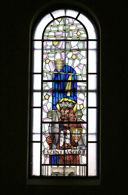 Budapest Pestszentlőrinc-Erzsébettelepi Szent Erzsébet templom, üvegablak (tervezője Csiby Mihály)